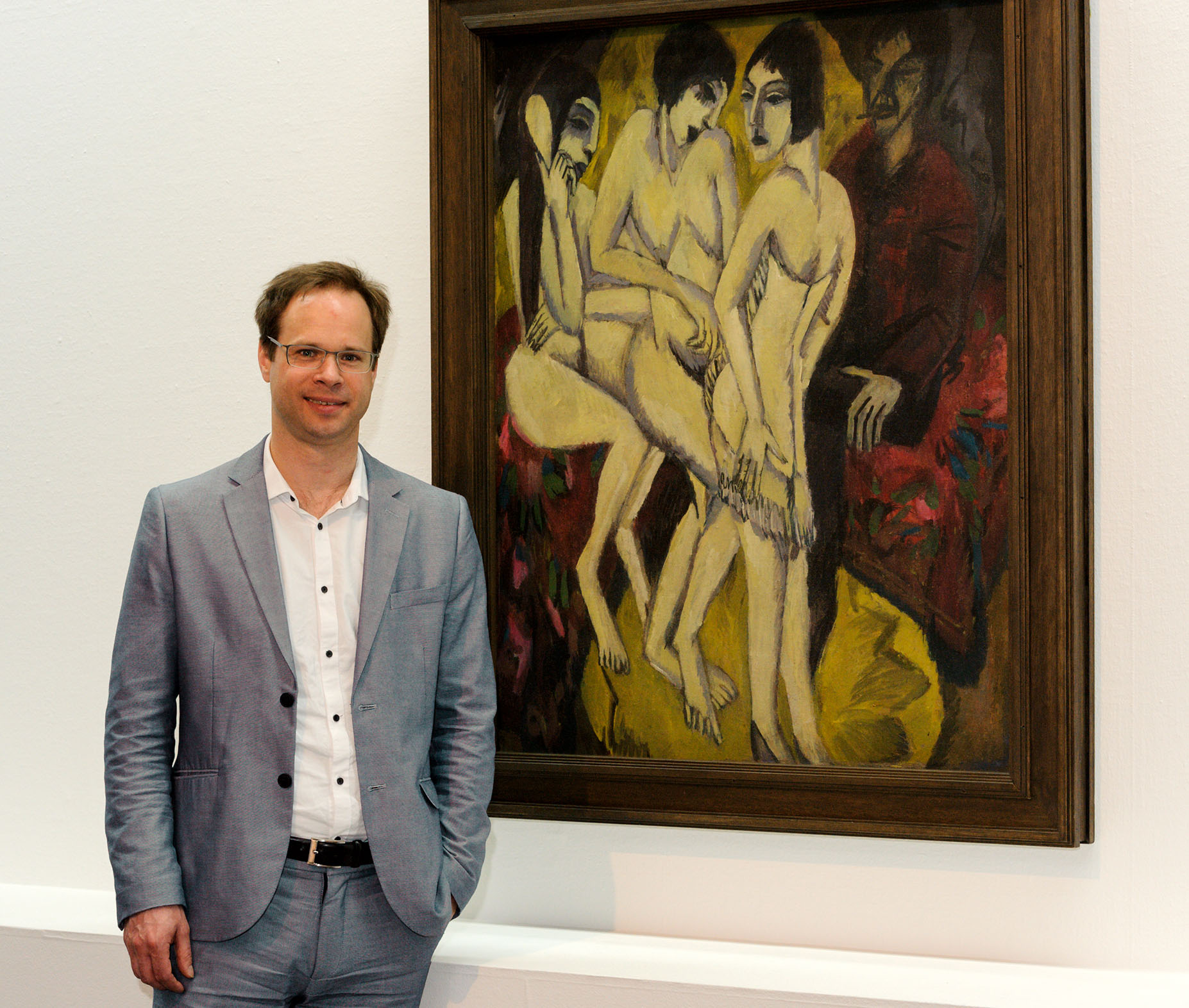 Dieses Foto wurde anlässlich der Spendenaktion zum Gemälde "Das Urteil des Paris" von Ernst Ludwig Kirchner aus dem Jahr 1913 aufgenommen.